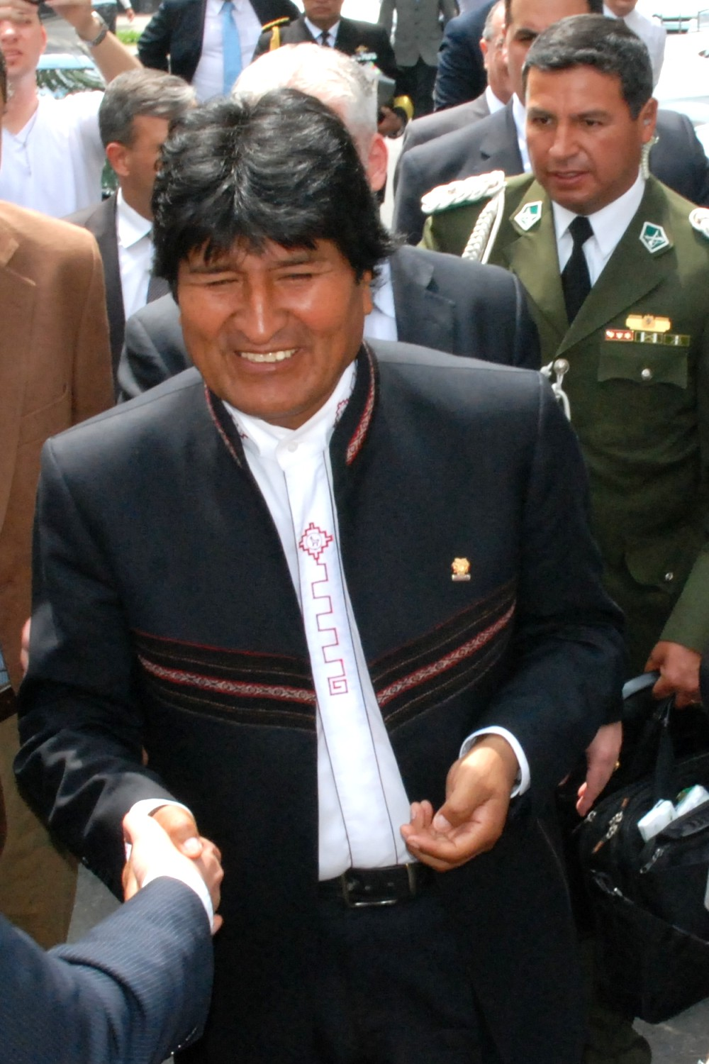 Evo Morales, presidente del Estado Plurinacional de Bolivia, durante su visita a la ciudad de La Plata, Argentina, el 15 de octubre de 2013.